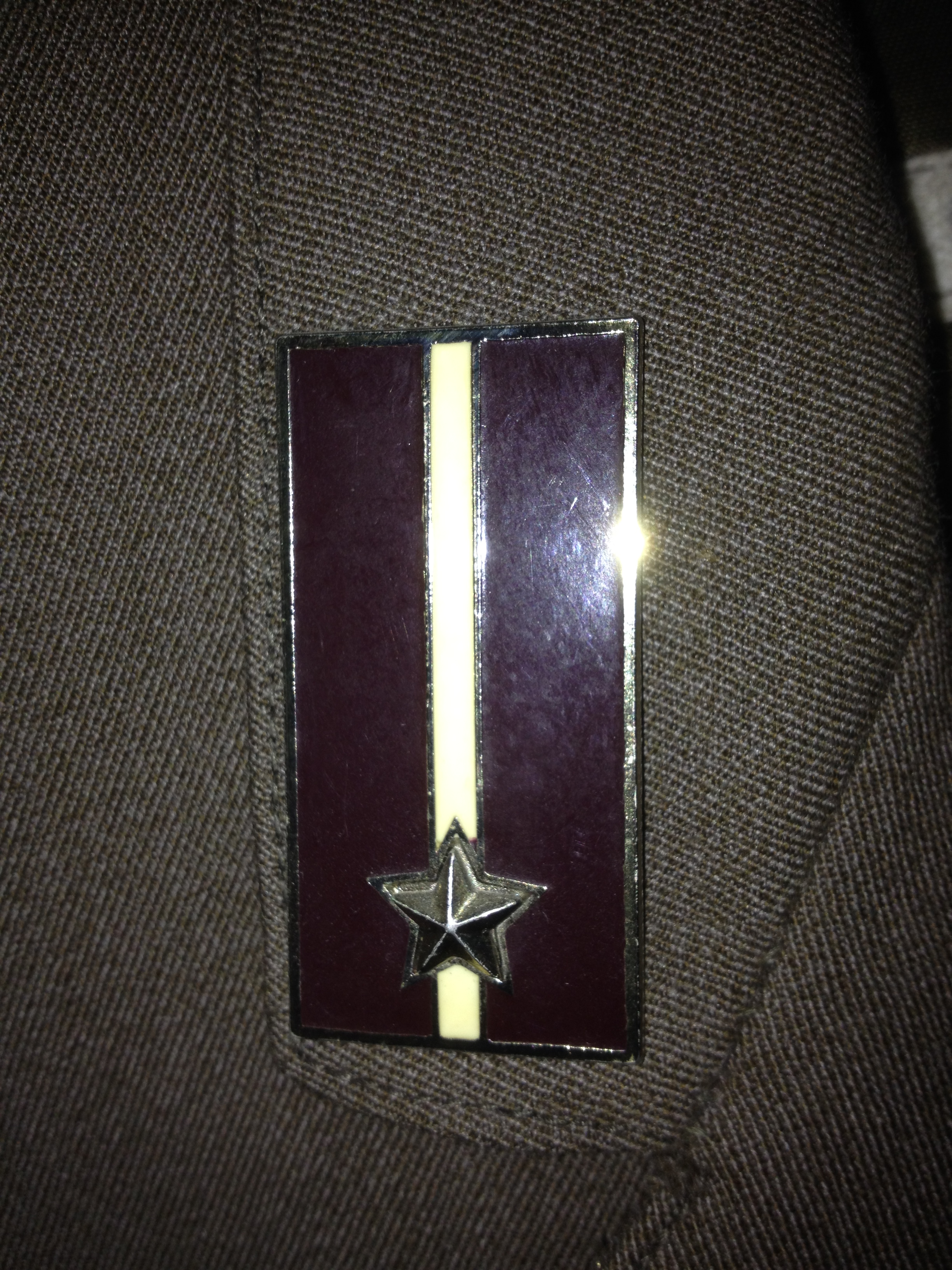 Mostrina su divisa originale 4 Compagnia Fucilieri